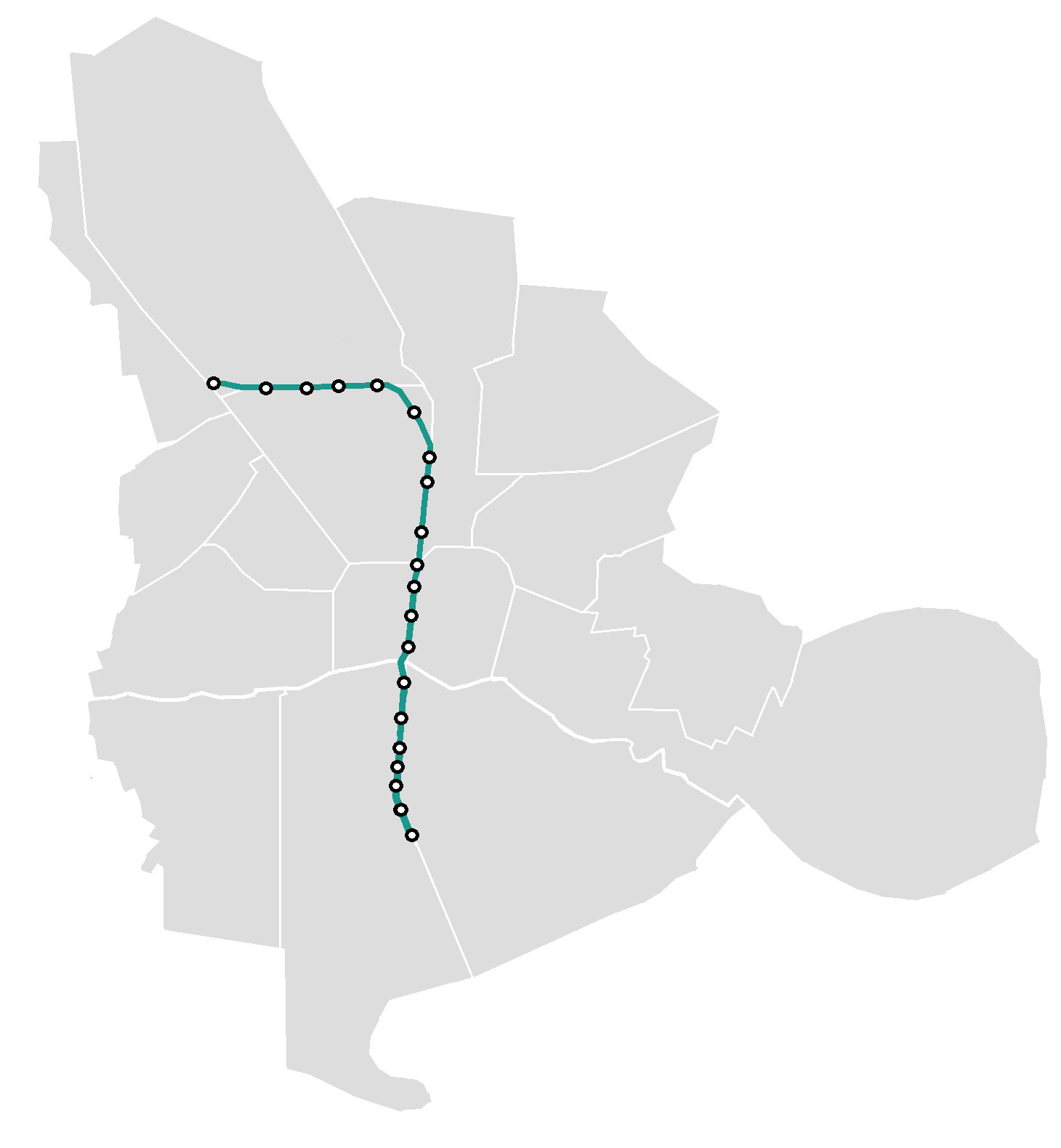 نقشه جغرافیایی خط قطار شهری اصفهان